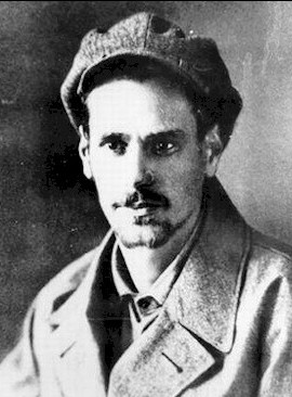 Олександр Шаргей (Юрій Кондратюк) - український вчений-винахідник, один із піонерів ракетної техніки й теорії космічних польотів.